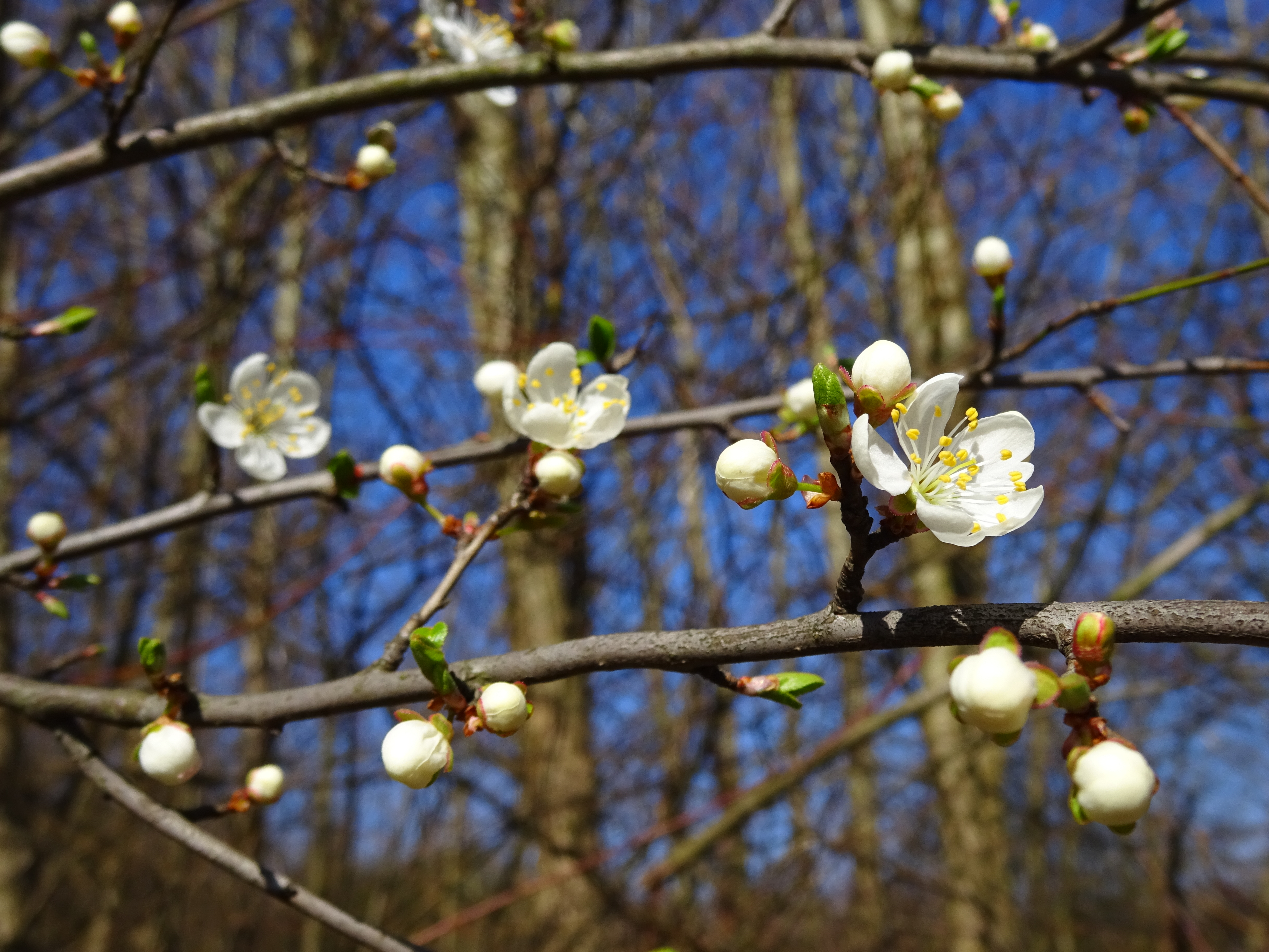 Kwiaty Śliwy mirabelki w Krakowie.